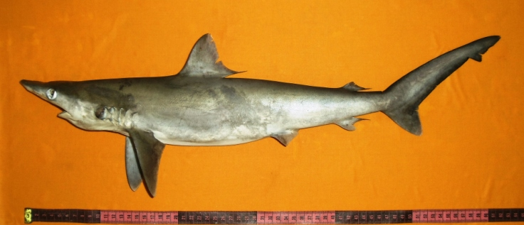 Carcharhinus macloti Karachi